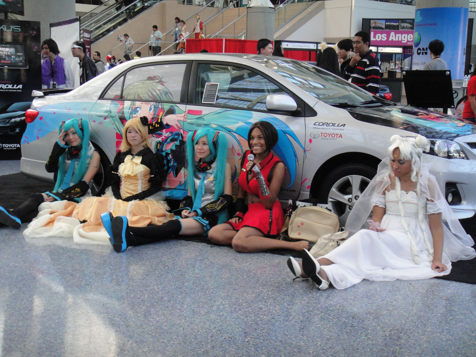 Anime Expo 2011